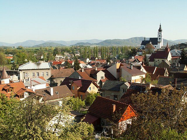 Příbor, v pozadí Šostýnské vrchy, zcela vzadu Moravskoslezské Beskydy, PUSTEVNY